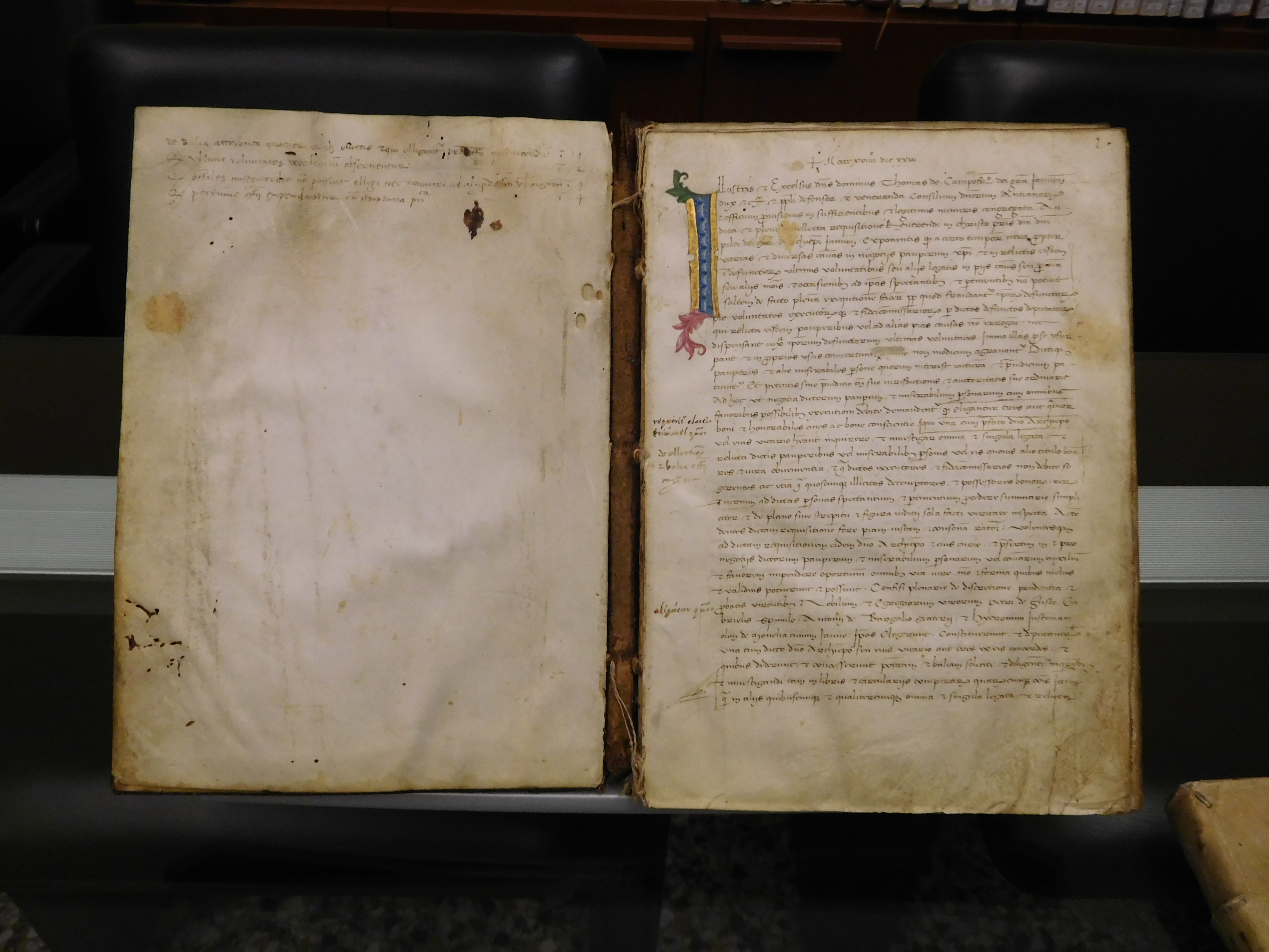 Magistrato di Misericordia di Genova. Atto di fondazione, XV secolo.